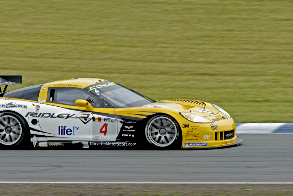 Chevrolet Corvette C6.R während des FIA-GT-Rennens is Oschersleben 2009